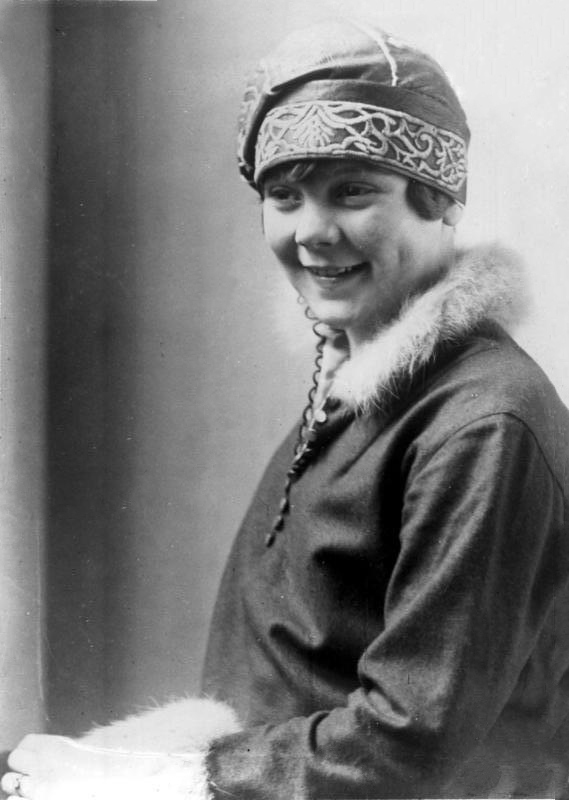 Die Eislaufweltmeisterin Sonja Henie ist in Berlin eingetroffen , um im Sportpalast ihre grosse Kunst zu zeigen. Porträt der Eislauf-Weltmeisterin Soja Henie.